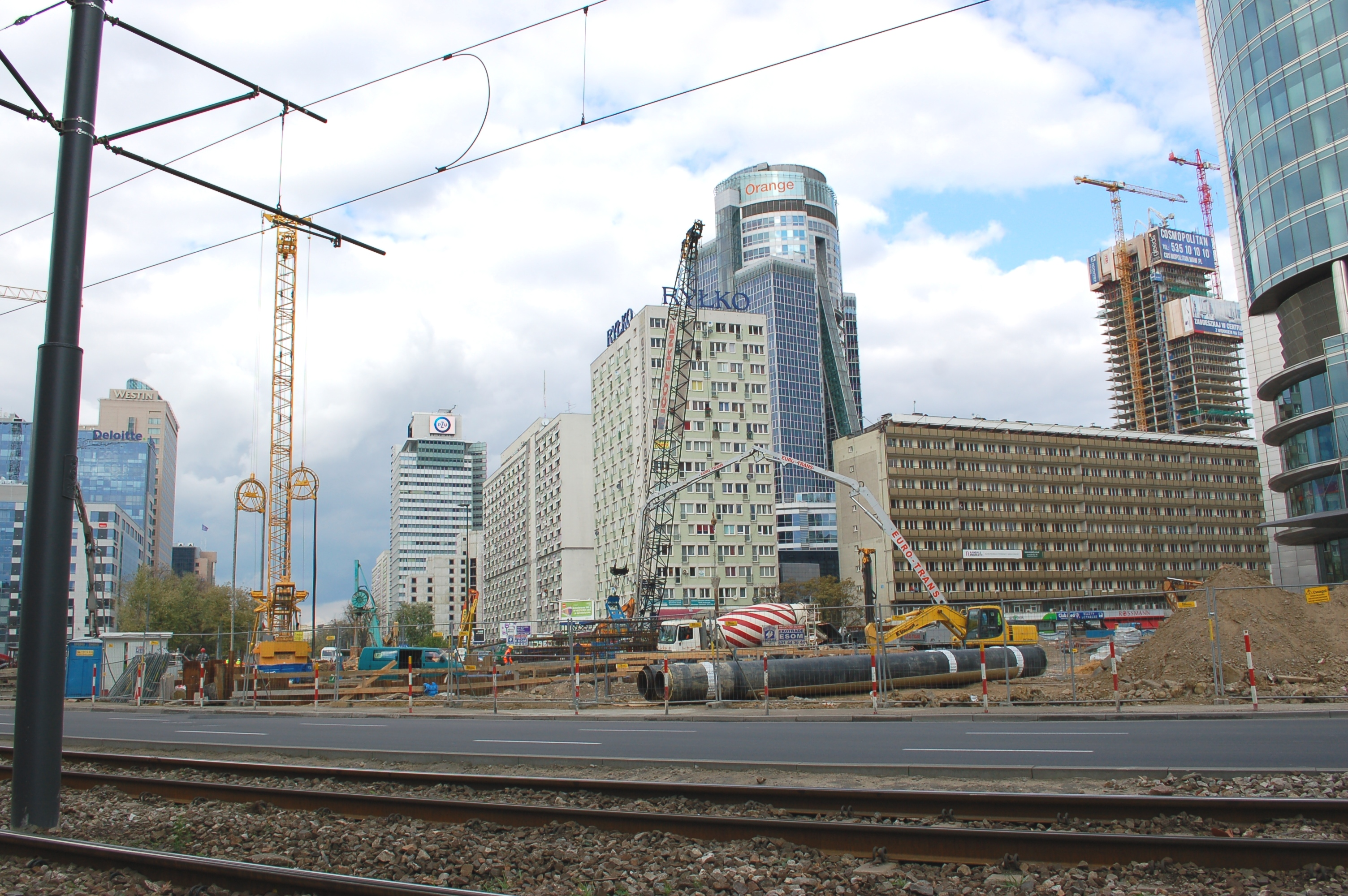 Metrobau Warschau